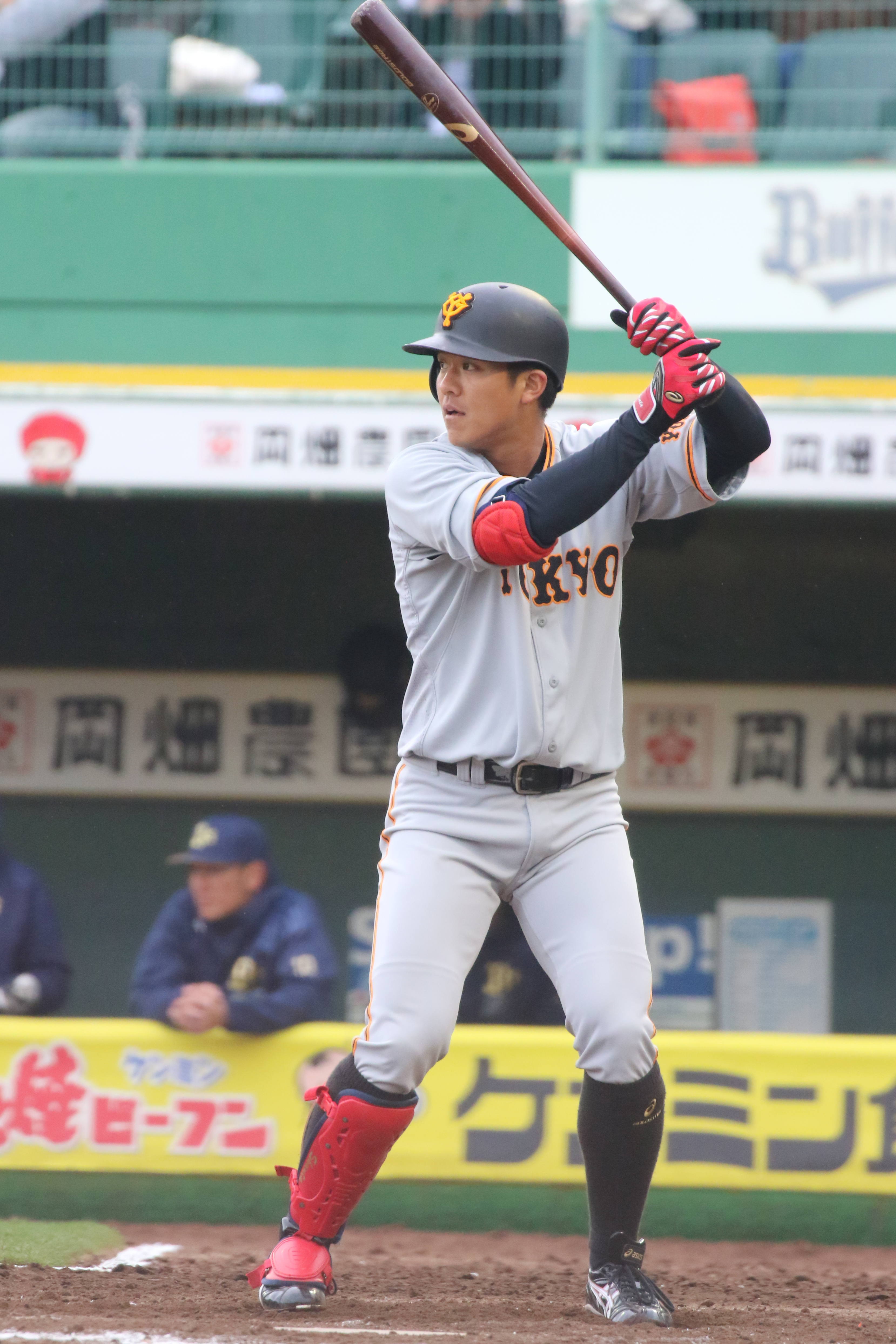 ジャイアンツ田中選手